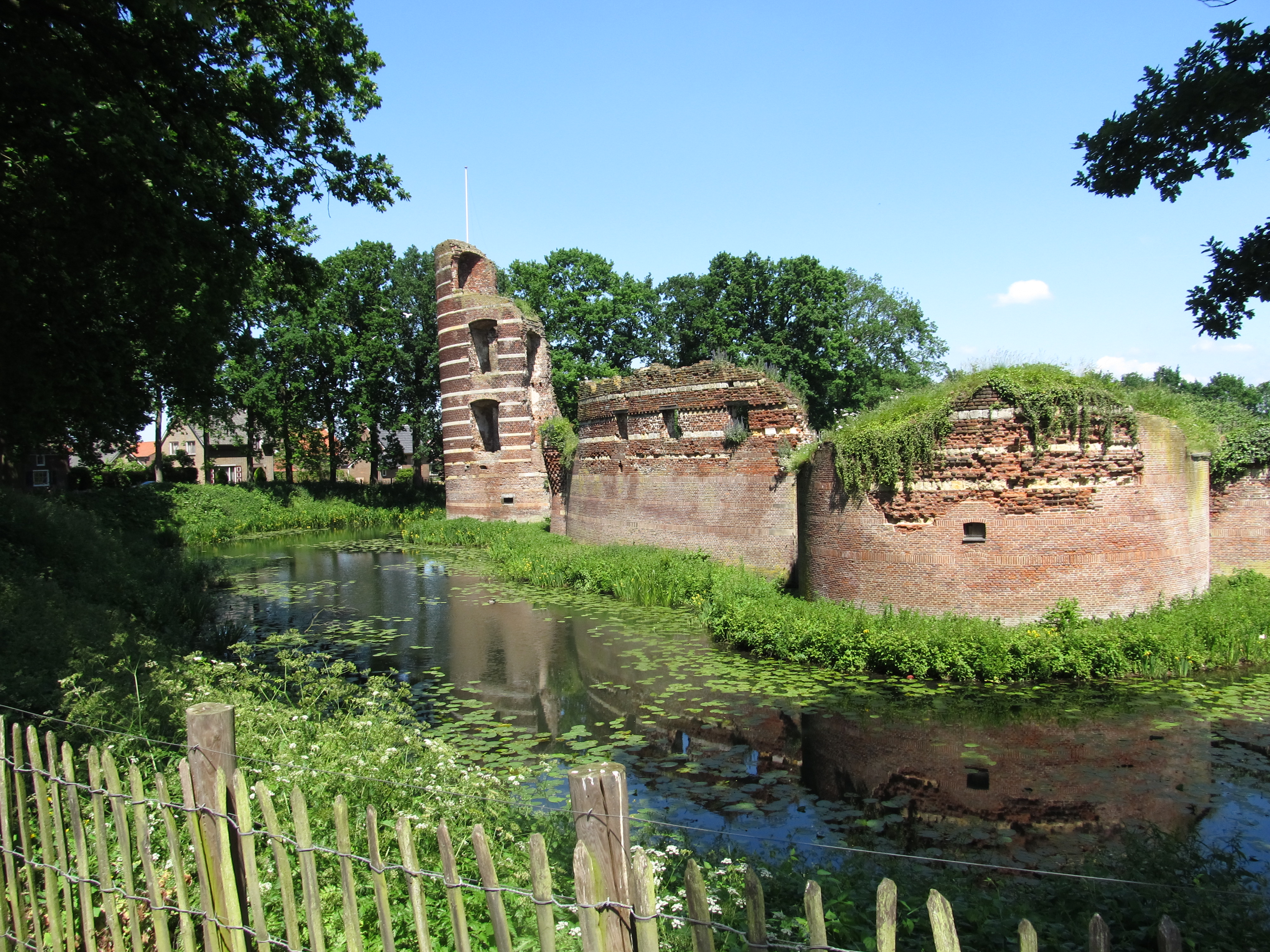 Ruïne kasteel Batenburg